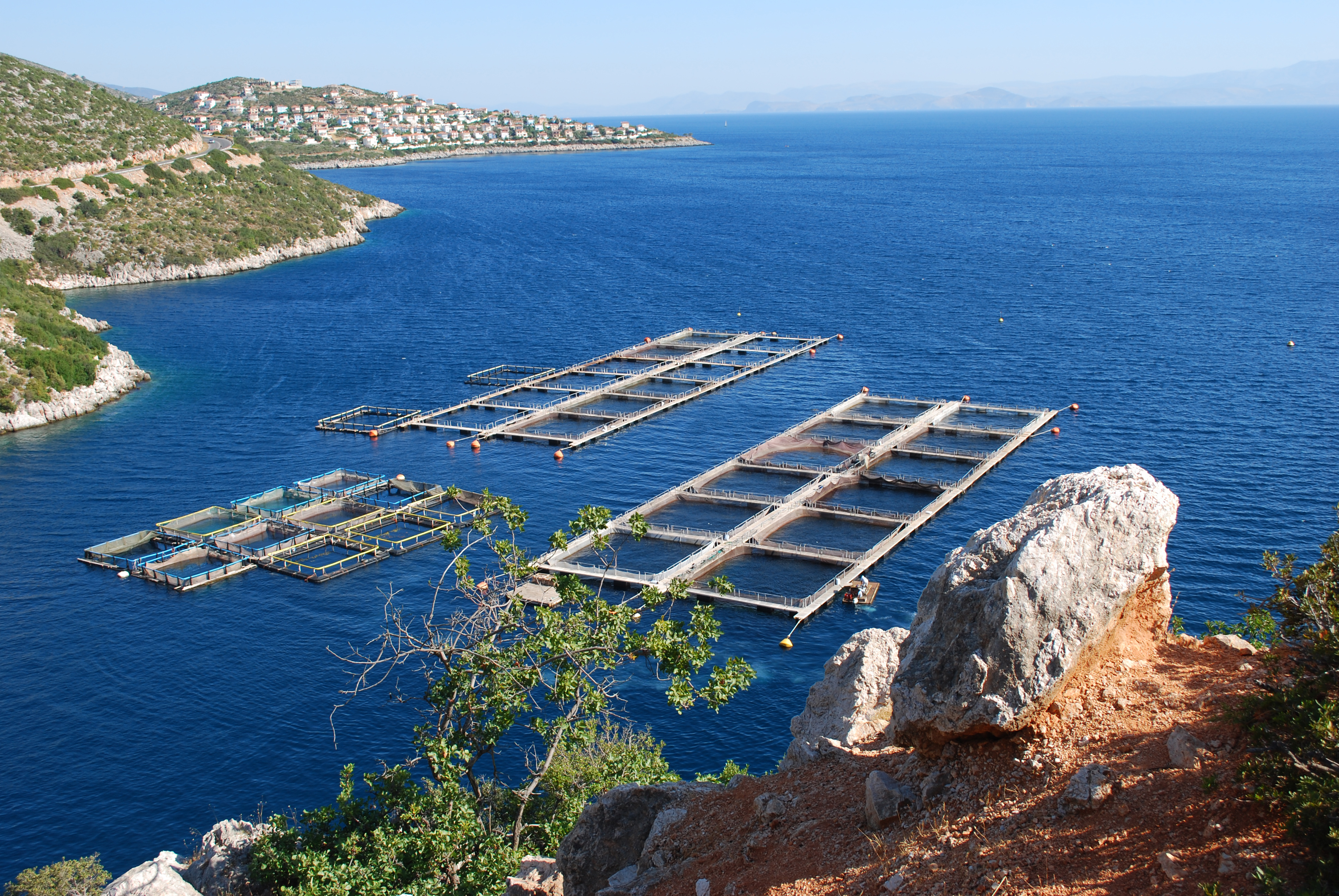 Vue du golfe Argolique, à proximité d'Astros.